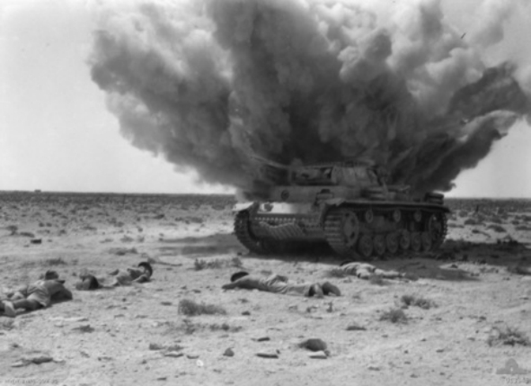 A German Panzerkampfwagen III Ausf.L being blown up near El Alamein on 5 October 1942.